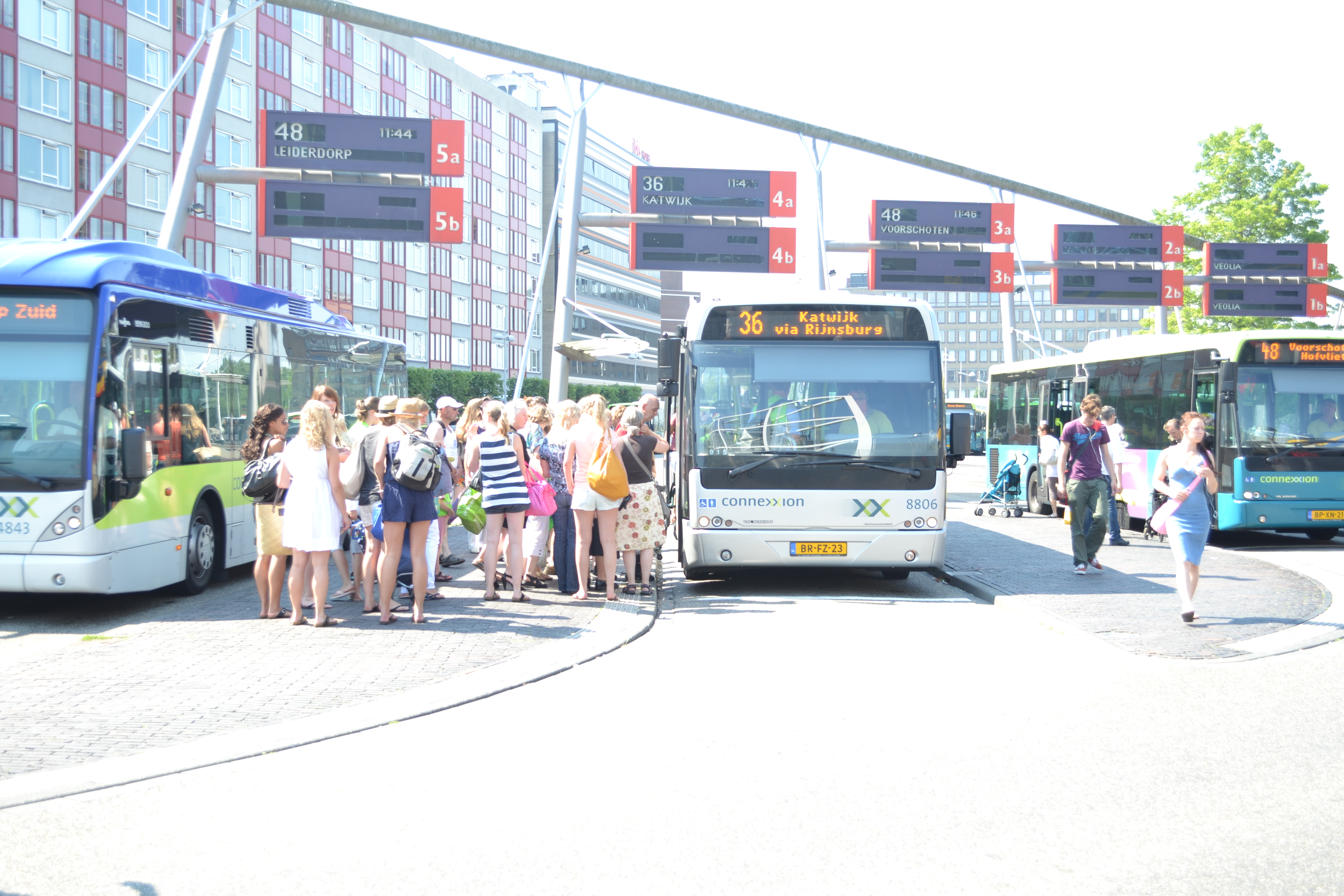 Connexxion 8806 als lijn 36 te Leiden Centraal. Op de dag dat deze foto genomen is was het zomers warm, en veel mensen namen deze bus richting het Katwijkse strand.